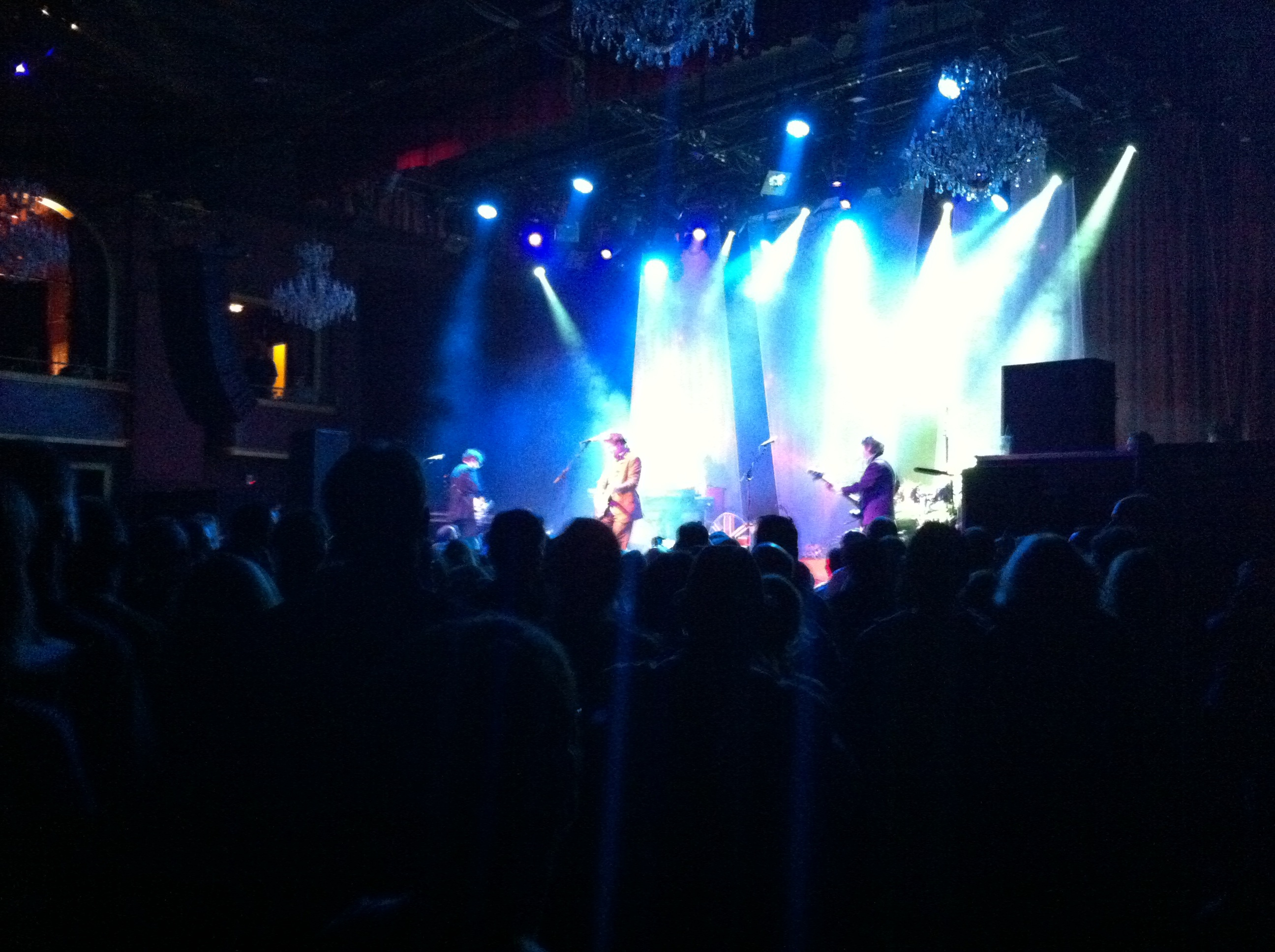 Live @ Fillmore